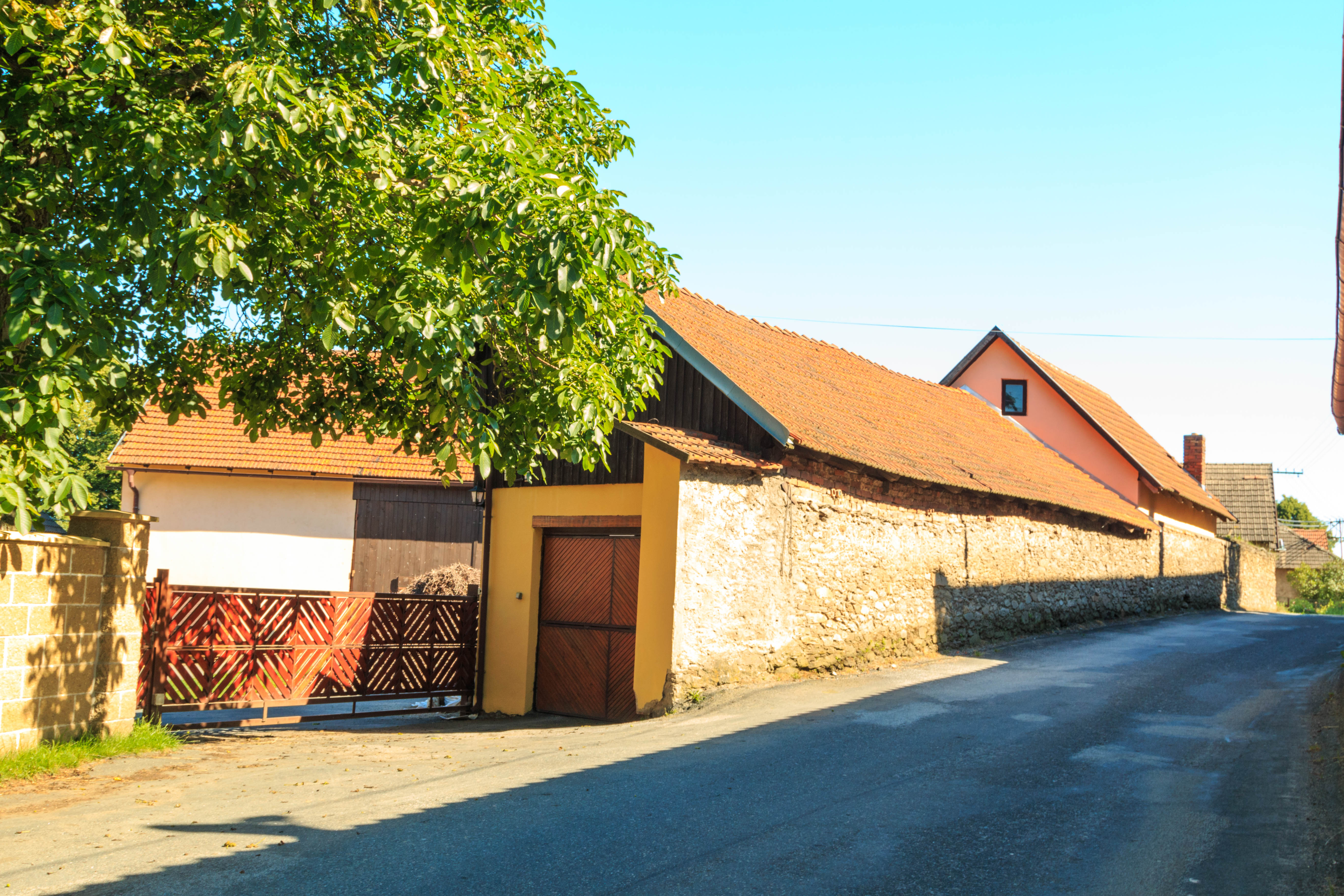 Rybníček u Havlíčkova Brodu čp. 1